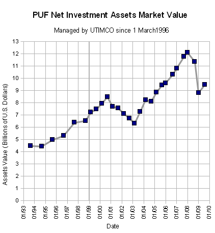 net investment assets, 1999-2009